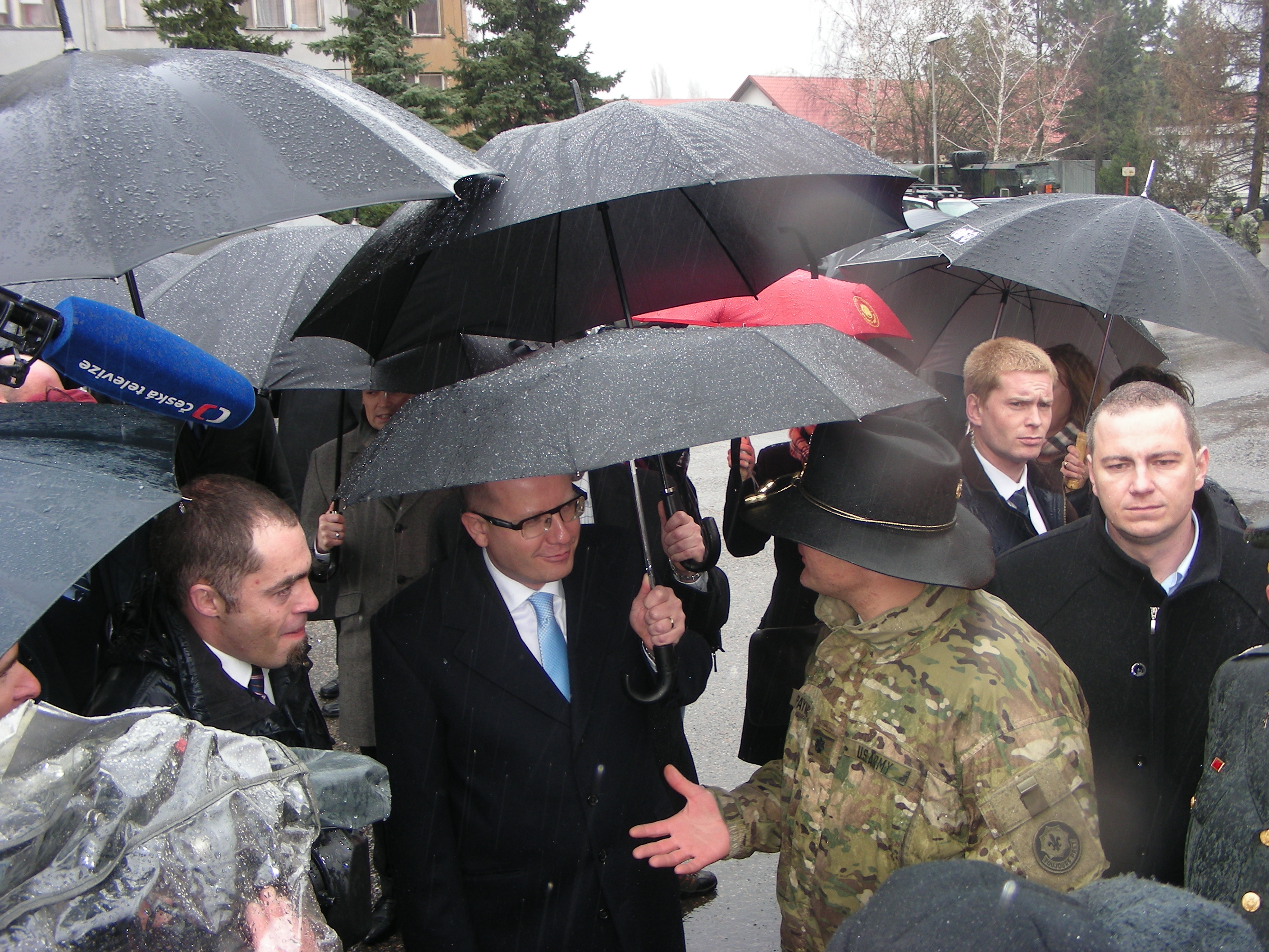 Na setkání s americkými vojáky a prohlídku jejich vojenské techniky dorazily 31. března na nádvoří ruzyňských kasáren tisíce lidí. Vojáky zde navštívil také premiér Bohuslav Sobotka.